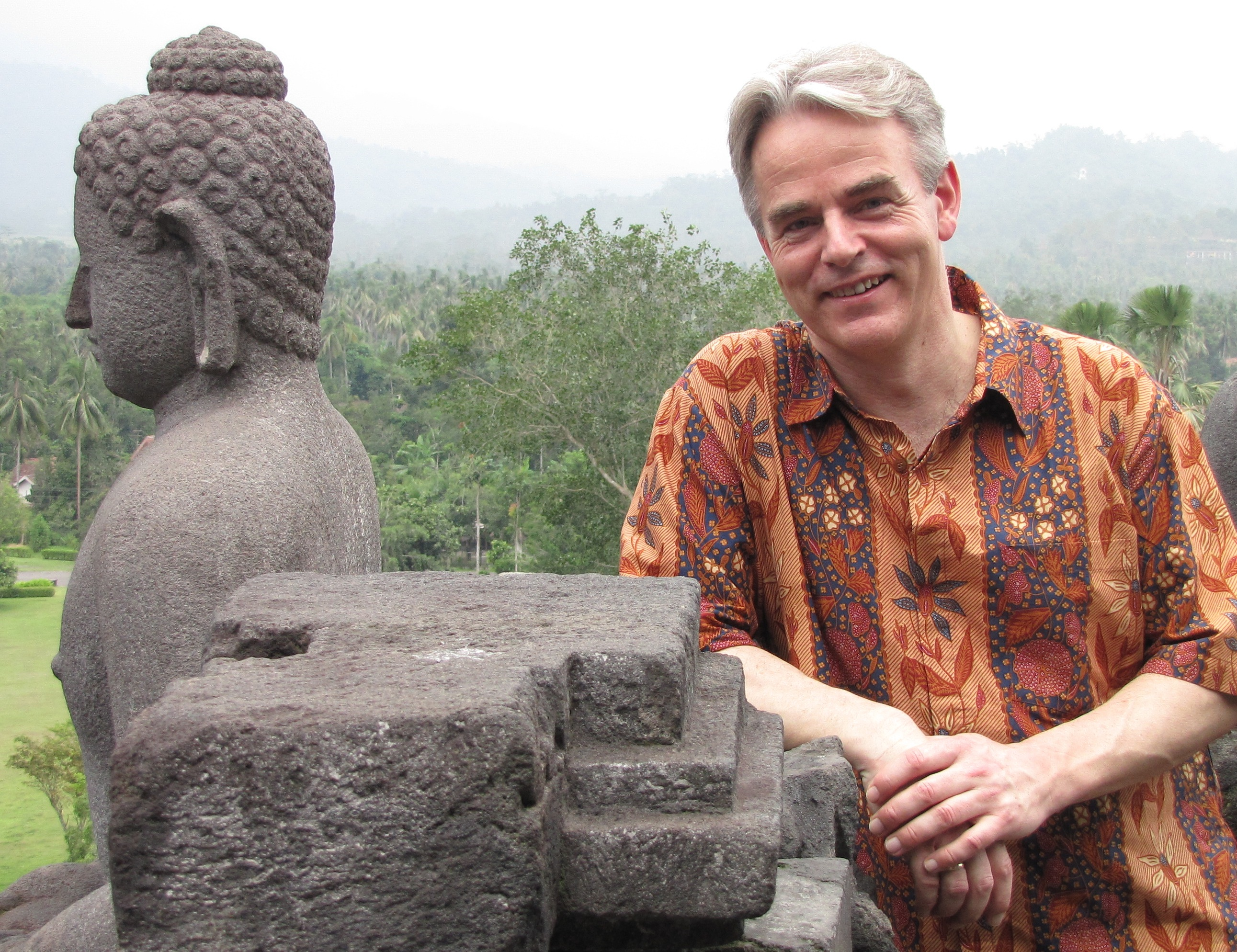 Indonesian